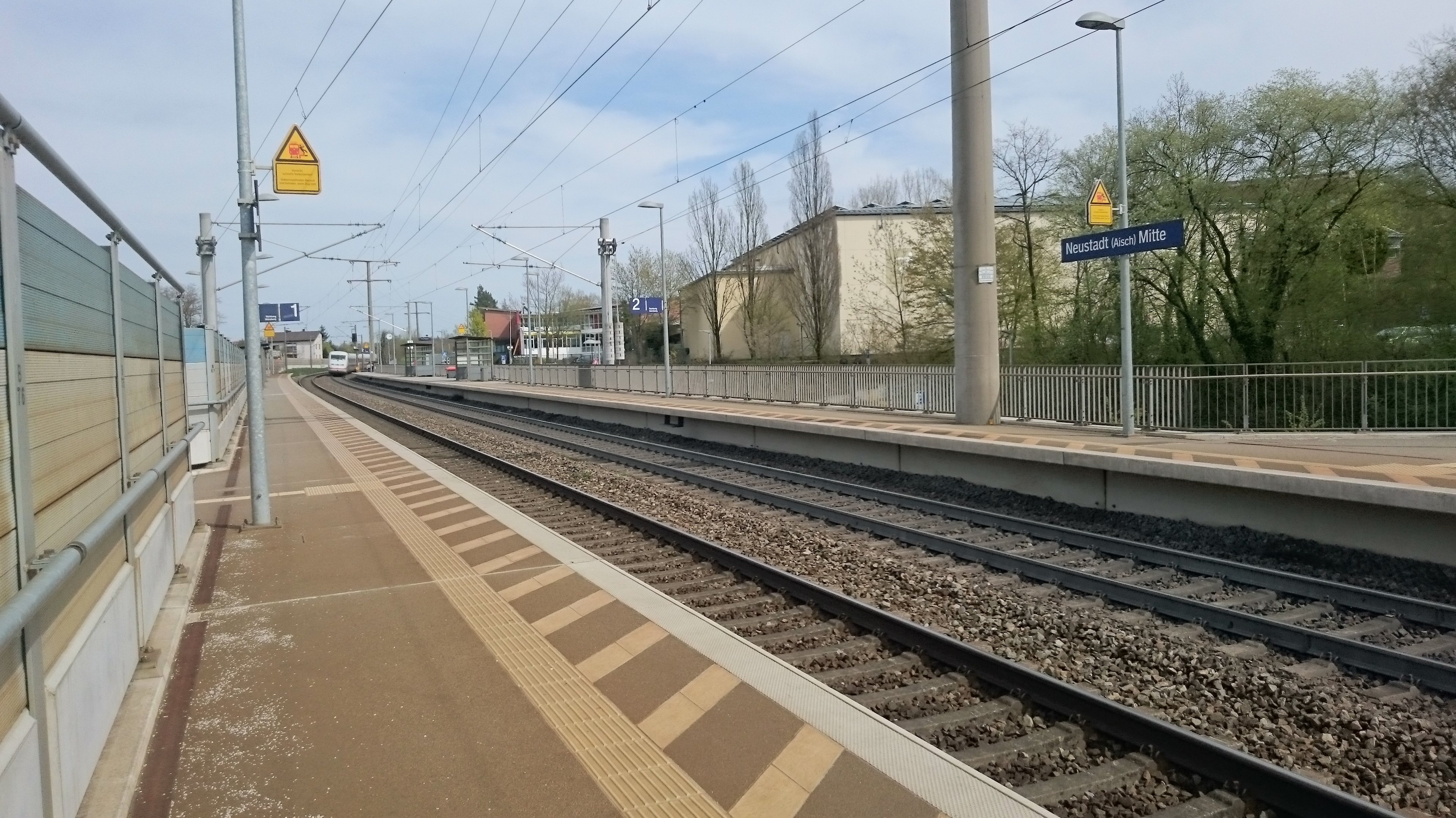 Bahnhof Neustadt an der Aisch Mitte